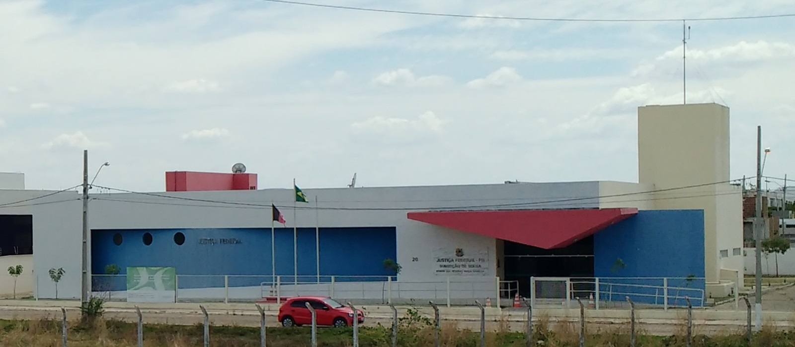 Português do Brasil: Prédio da Justiça Federal em Sousa - Paraíba, Brasil.